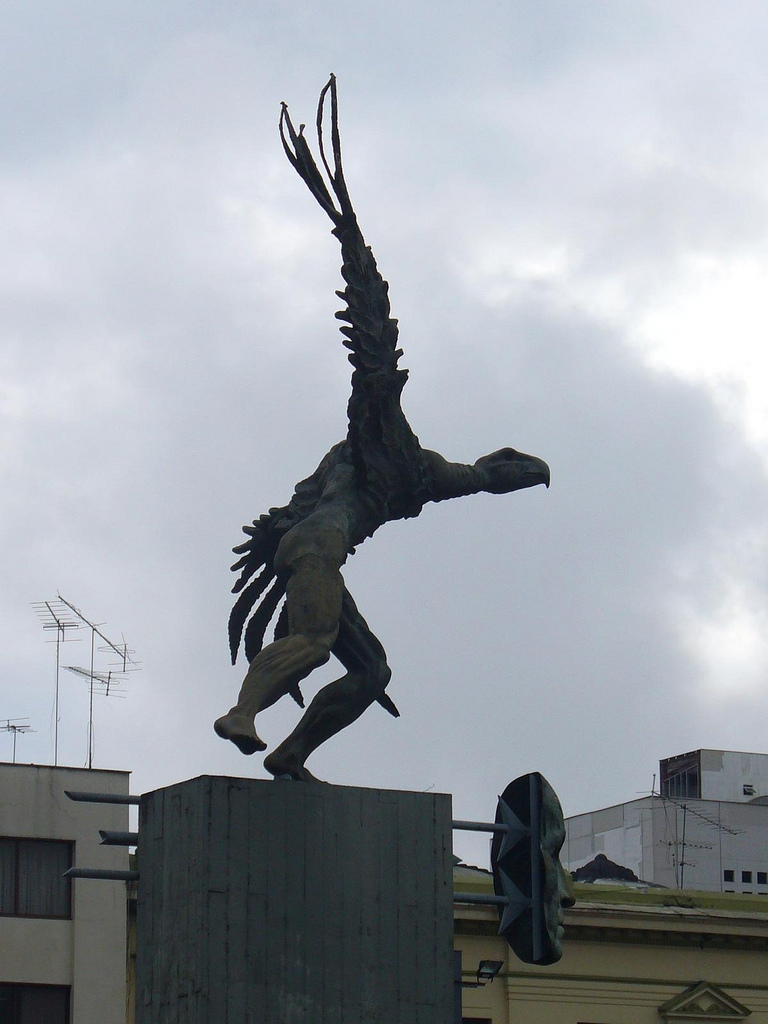 Bolivar, el cóndor (Mochileo, Colombia).